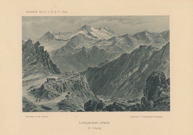 Lenkjöchlhütte historisch